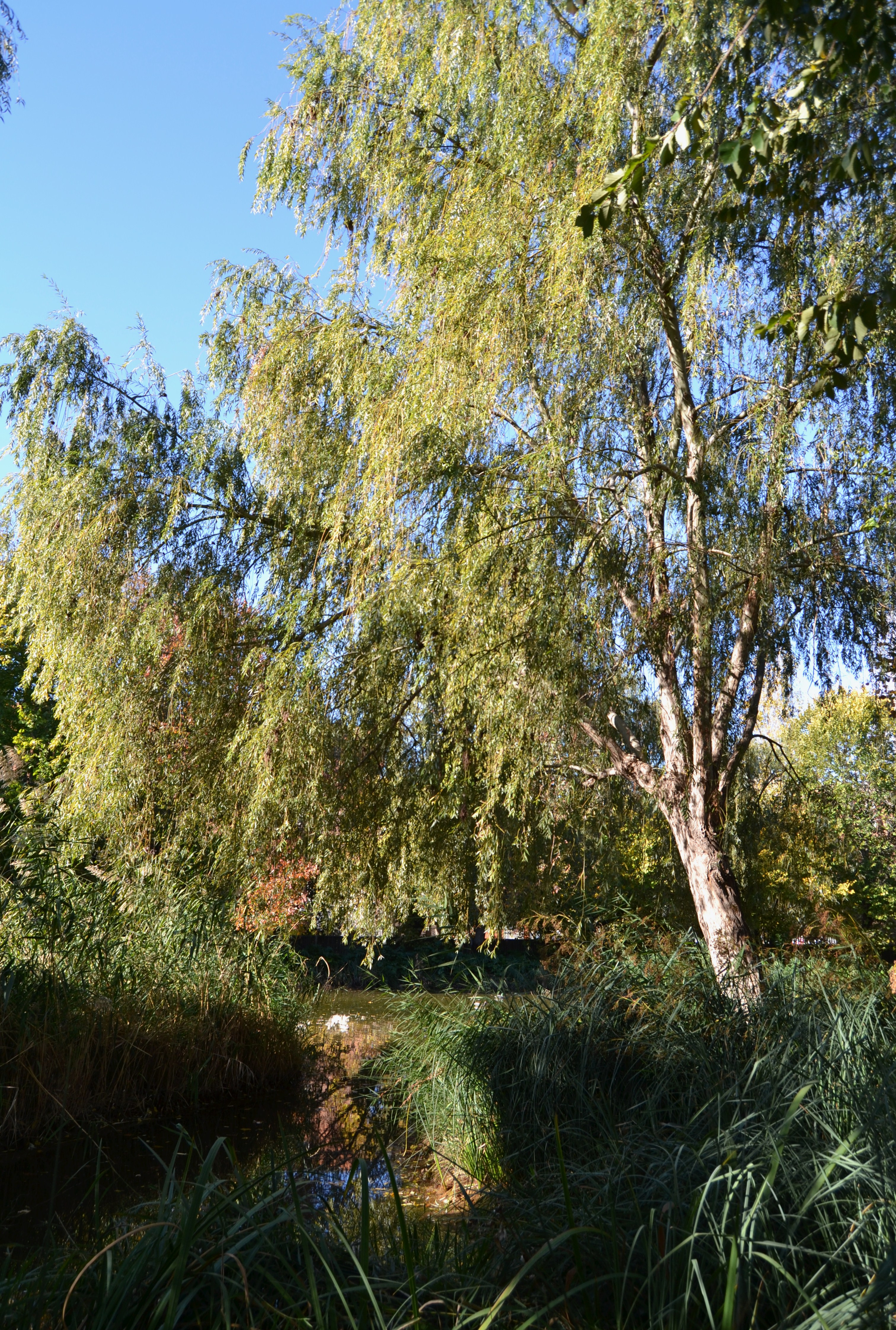 Desmai, llacuna del parc de Marxalenes.